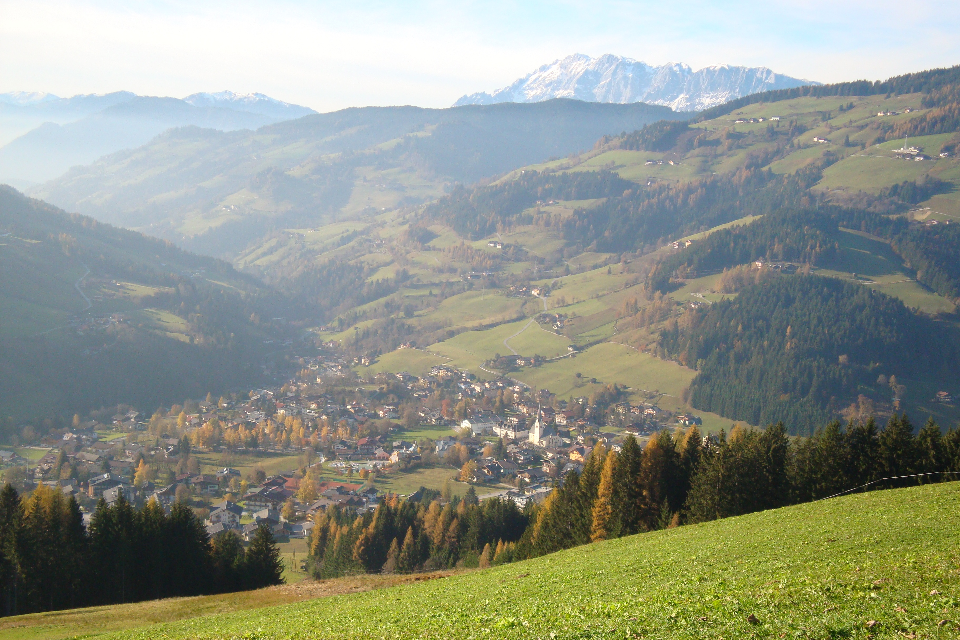 Wagrain im Land-Salzburger Bezirk St. Johann im Pongau